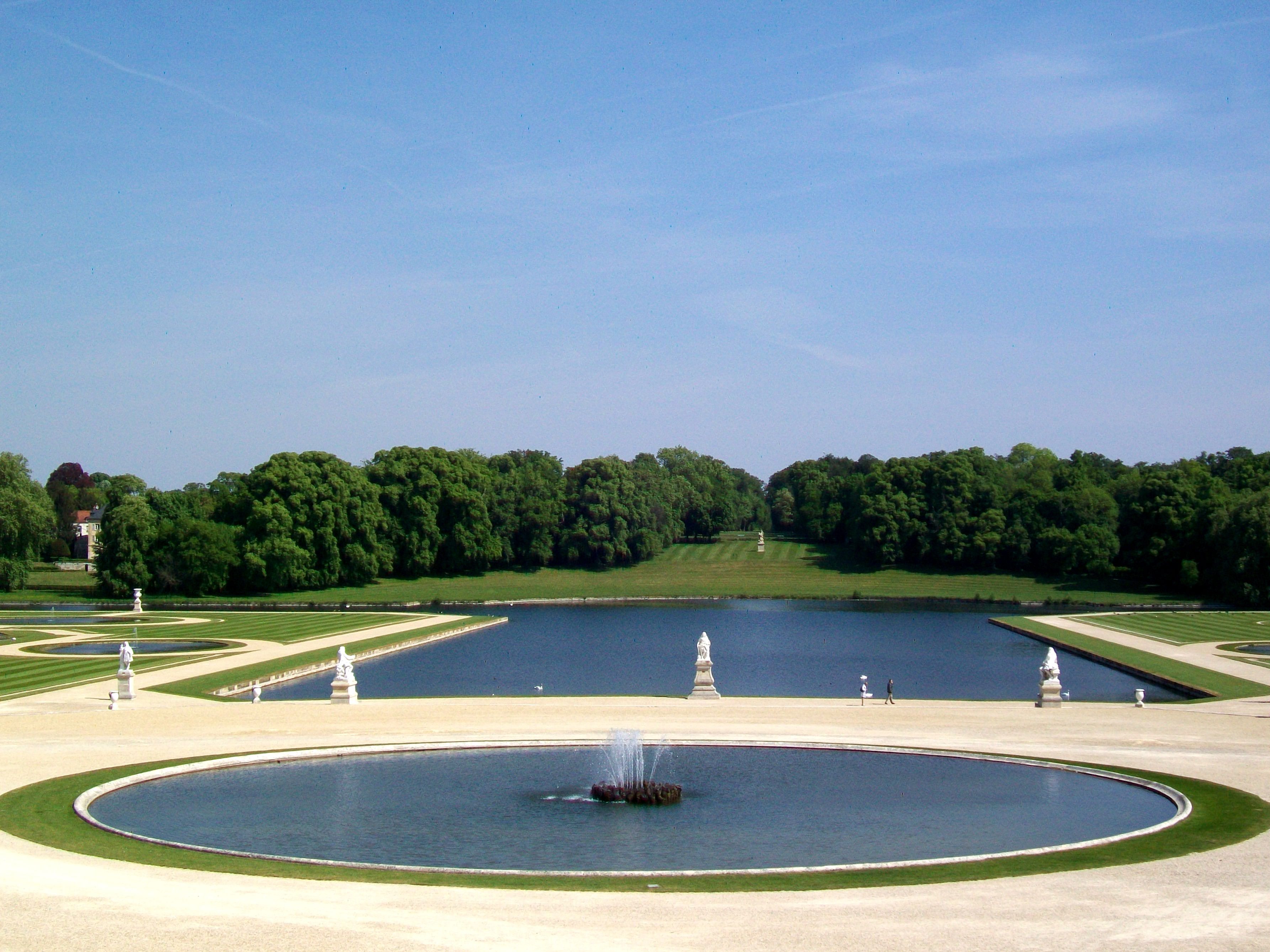 Le jardin à la française est faite de parterres et de pièces d'eau : au centre, le grand bassin relié au Grand Canal (à peine visible), et au premier plan, un miroir d'eau.